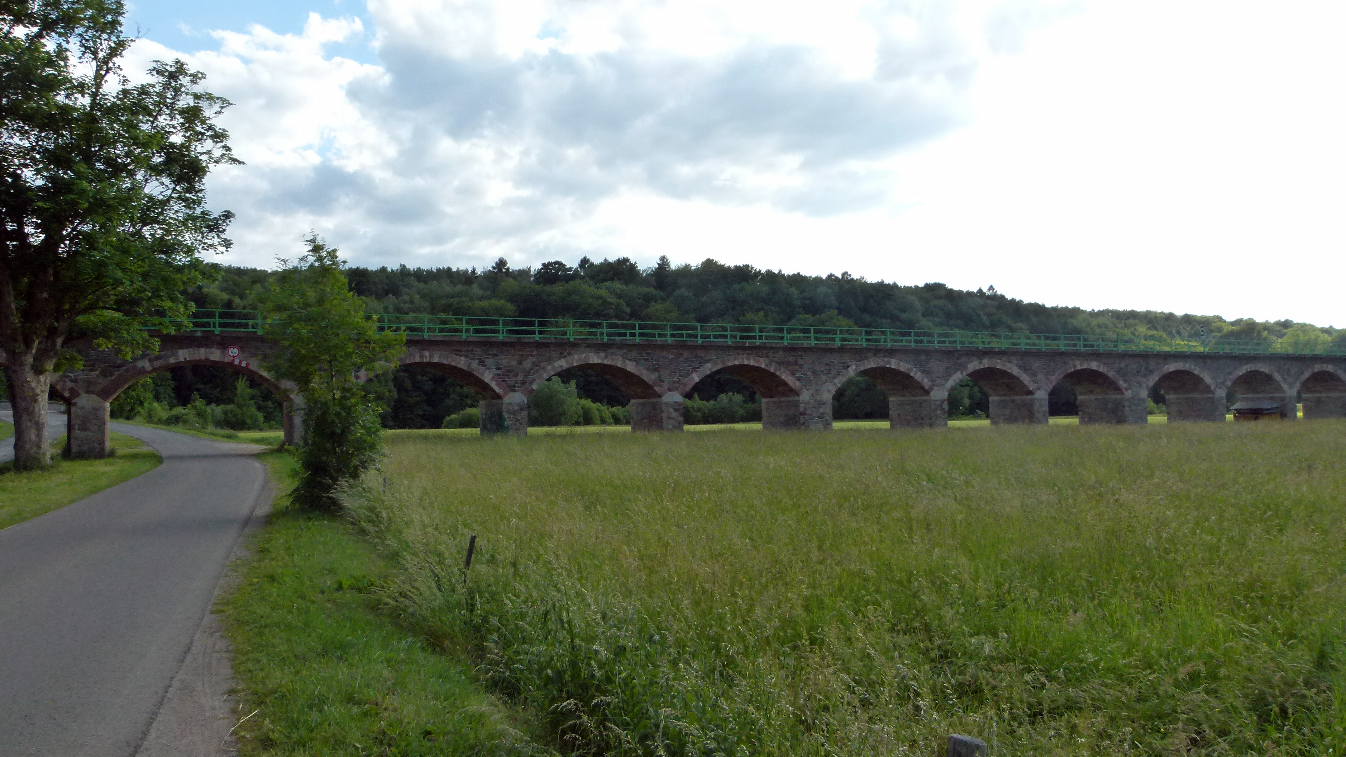 Viadukt - Braunsdorfer Eisenbahnbrücke, Niederwiesa, Sachsen